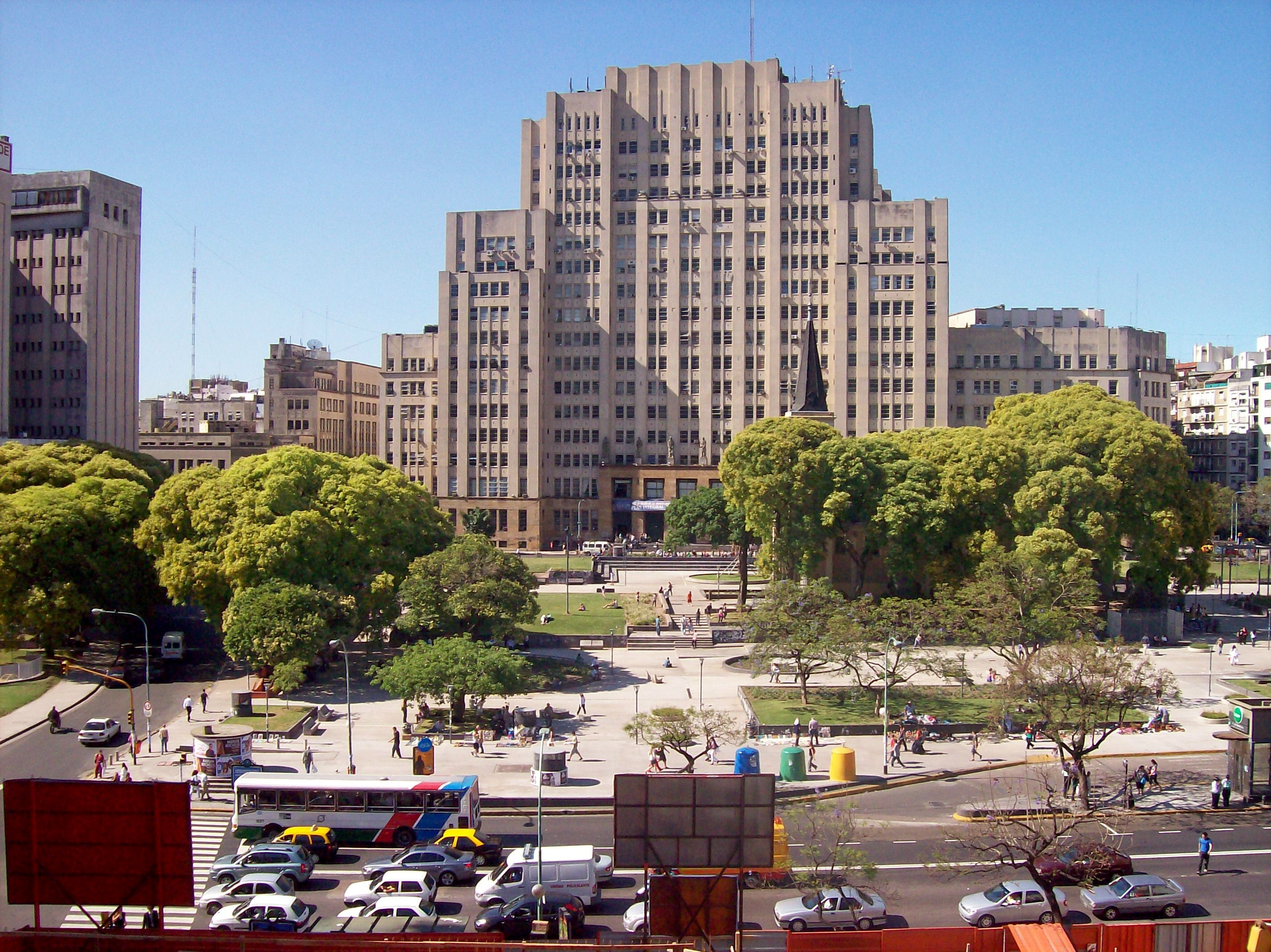 Plaza Houssay (Av Córdoba al 2100) y al fondo la Facultad de Medicina de la UBA, en Recoleta, Buenos Aires.